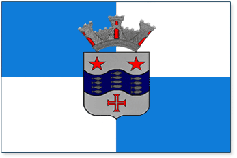 Bandeira do Município de Arujá, São Paulo